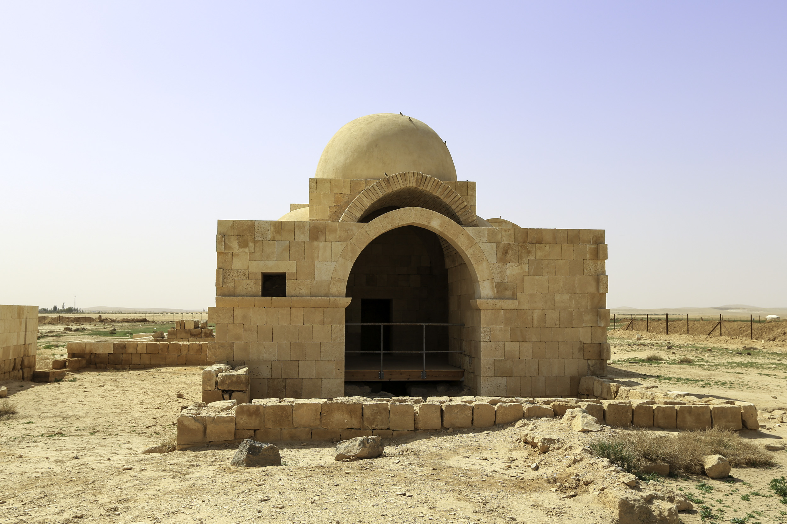 Hammam al-Sarah